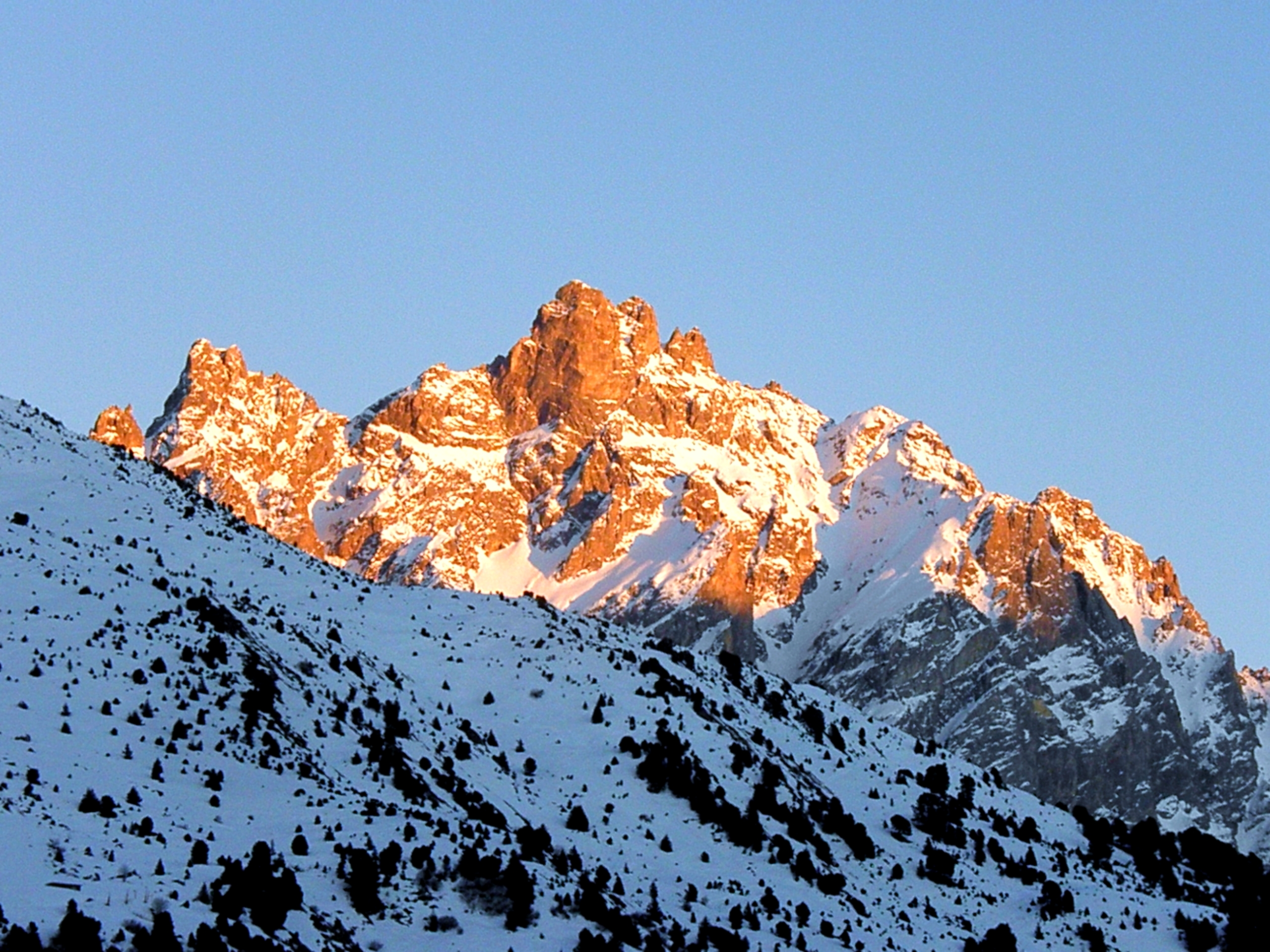 Aiguille du Fruit (3 051 m d'altitude) vue de Méribel-Mottaret